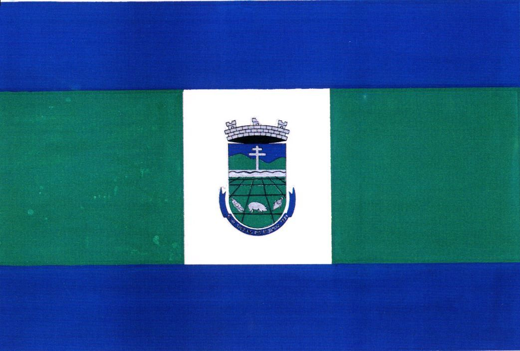 Bandeira da cidade de Campina das Missões, localizado no noroeste do estado do Rio Grande do Sul, região sul do Brasil.